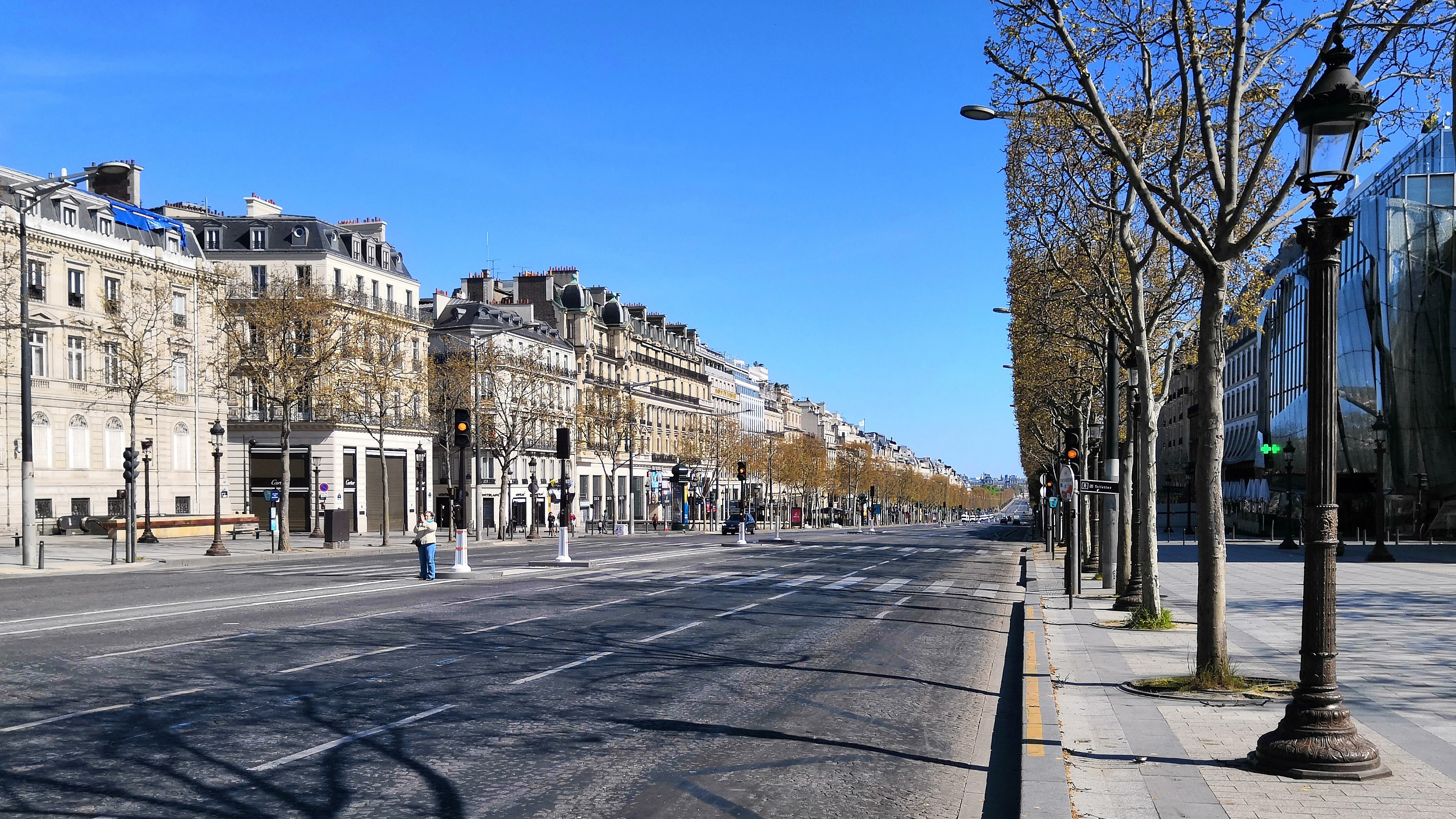 smartcapture